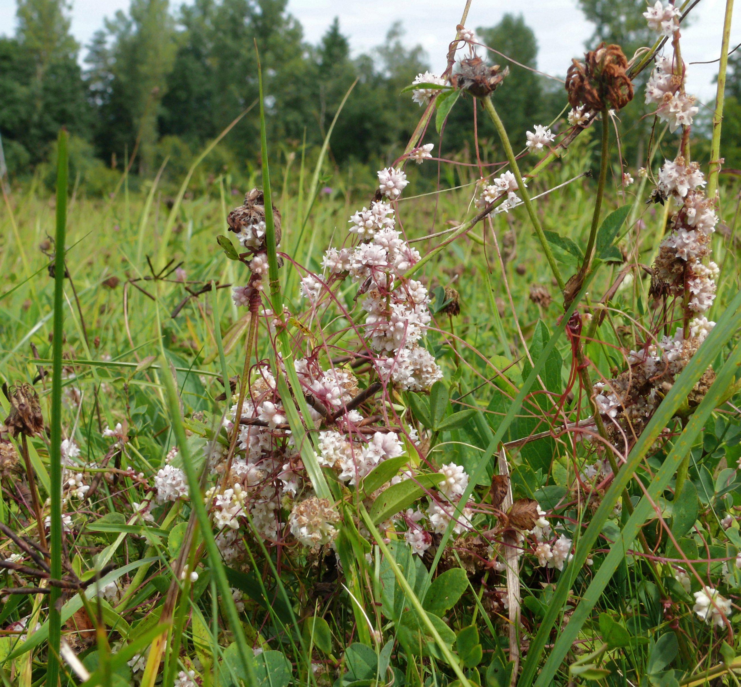 Cuscuta epithymum, Schwäbisch-Fränkische Waldberge, Deutschland